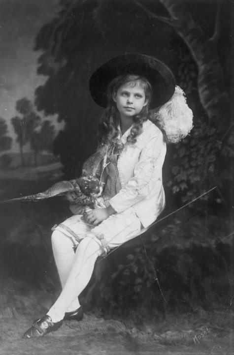 Kinderbildnis im Pagenkost¸m.